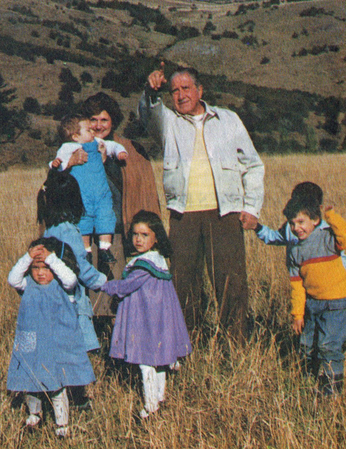 Panfleto de apoyo a la opción Sí en el plebiscito nacional de 1988 en Chile.